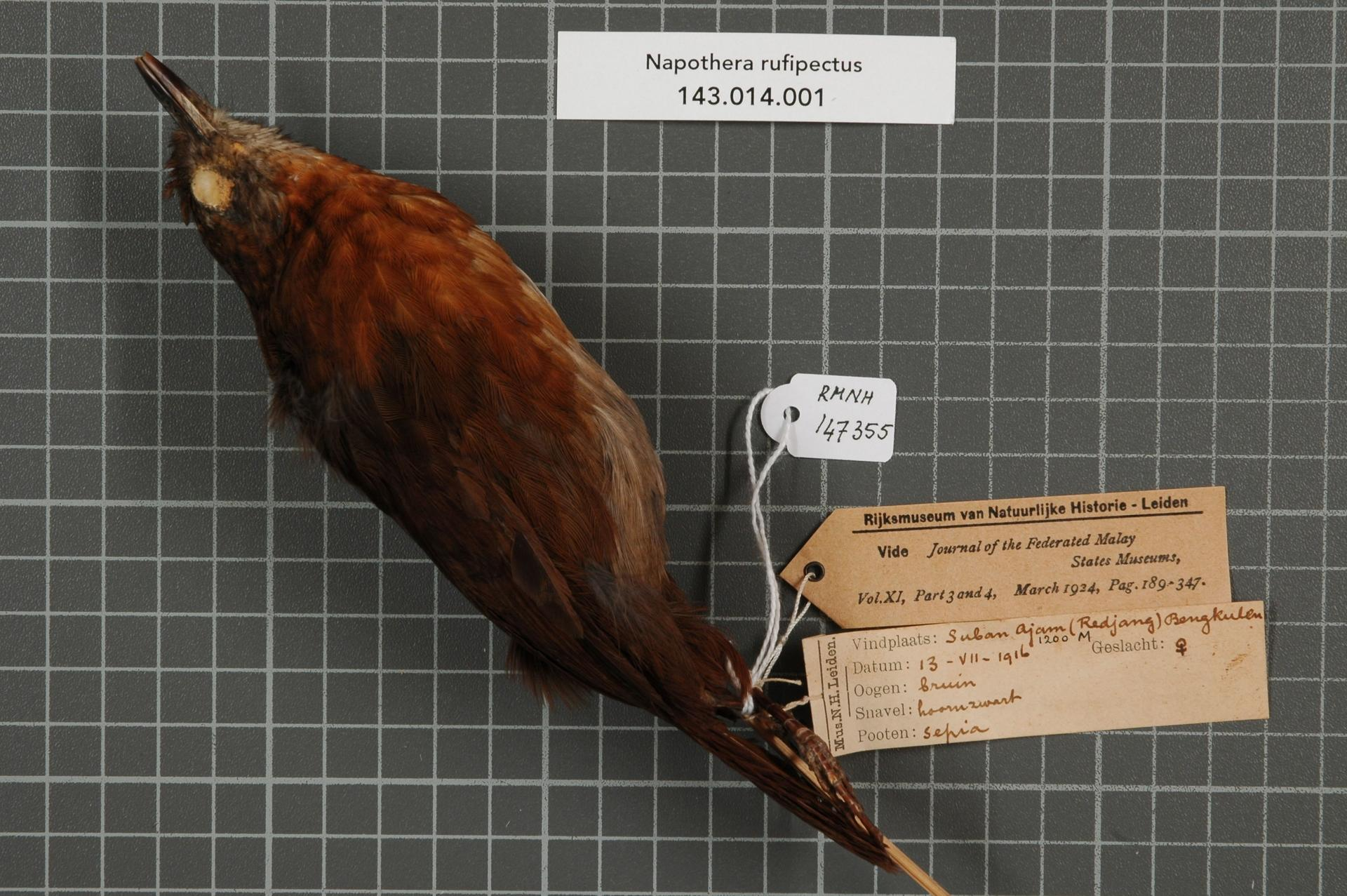 Napothera rufipectus (Salvadori, 1879)